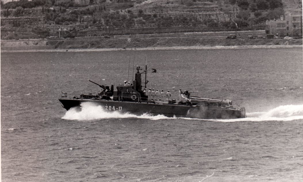 טרפדת ט-204 בהפלגת הצדעה ליד ראש הכרמל